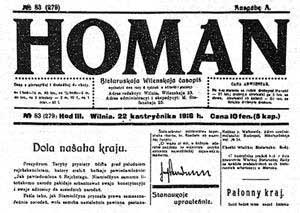 Гоман (1916) Беларуская (тарашкевіца): Беларуская газэта Homan, 1918